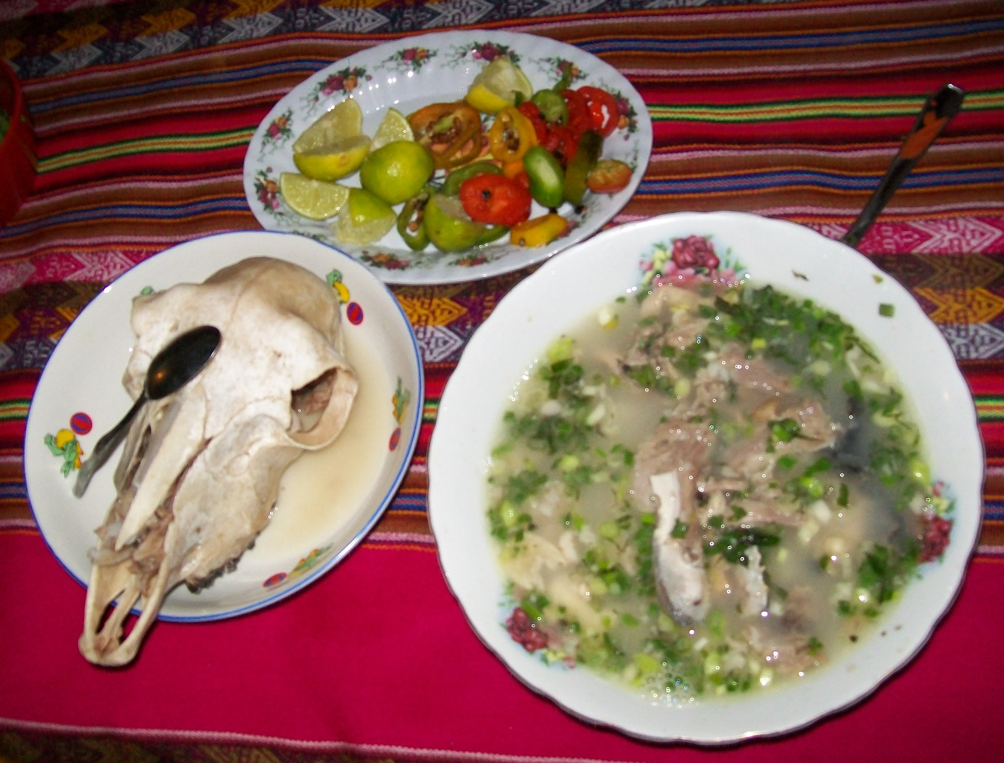 Gastronomía de Ocros Nombre: Caldo de Cabeza País: Perú Fotógrafo:© Edgar Amador Espinoza Montesinos